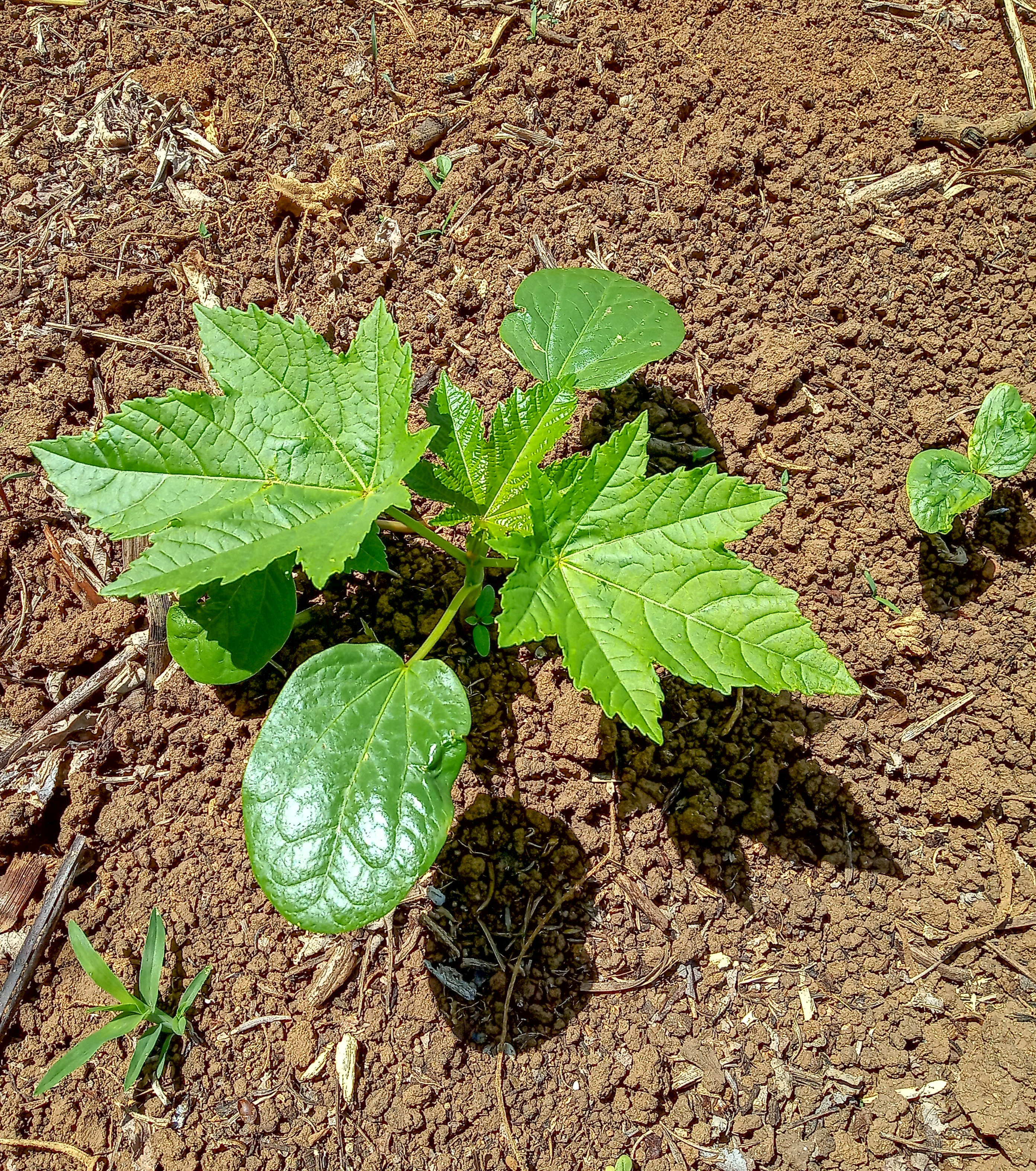 Jeune Plant de Ricin commun